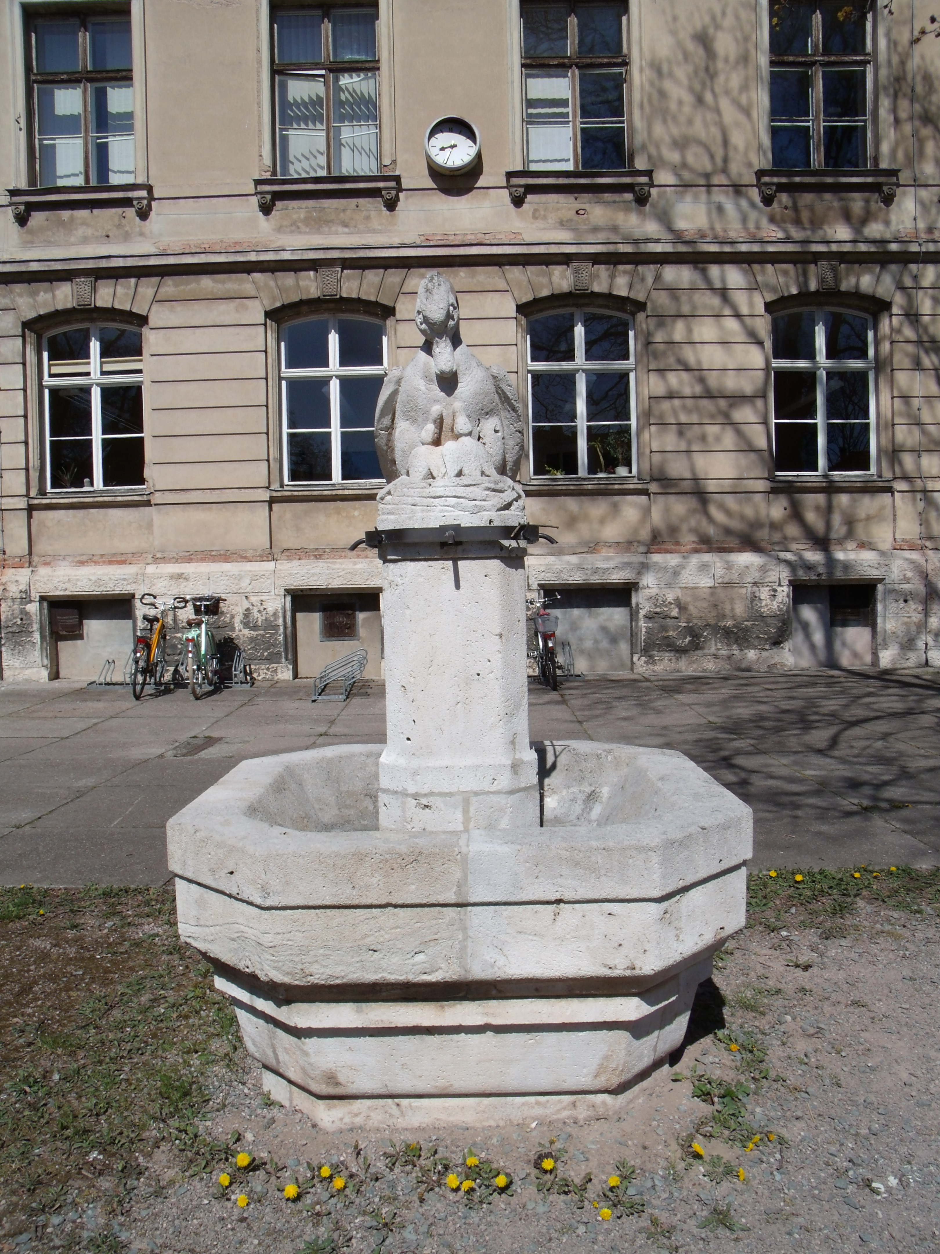 Stockentenbrunnen im Hof der Käthe-Kollwitz-Schule in der Röhrstraße 19 in Weimar.